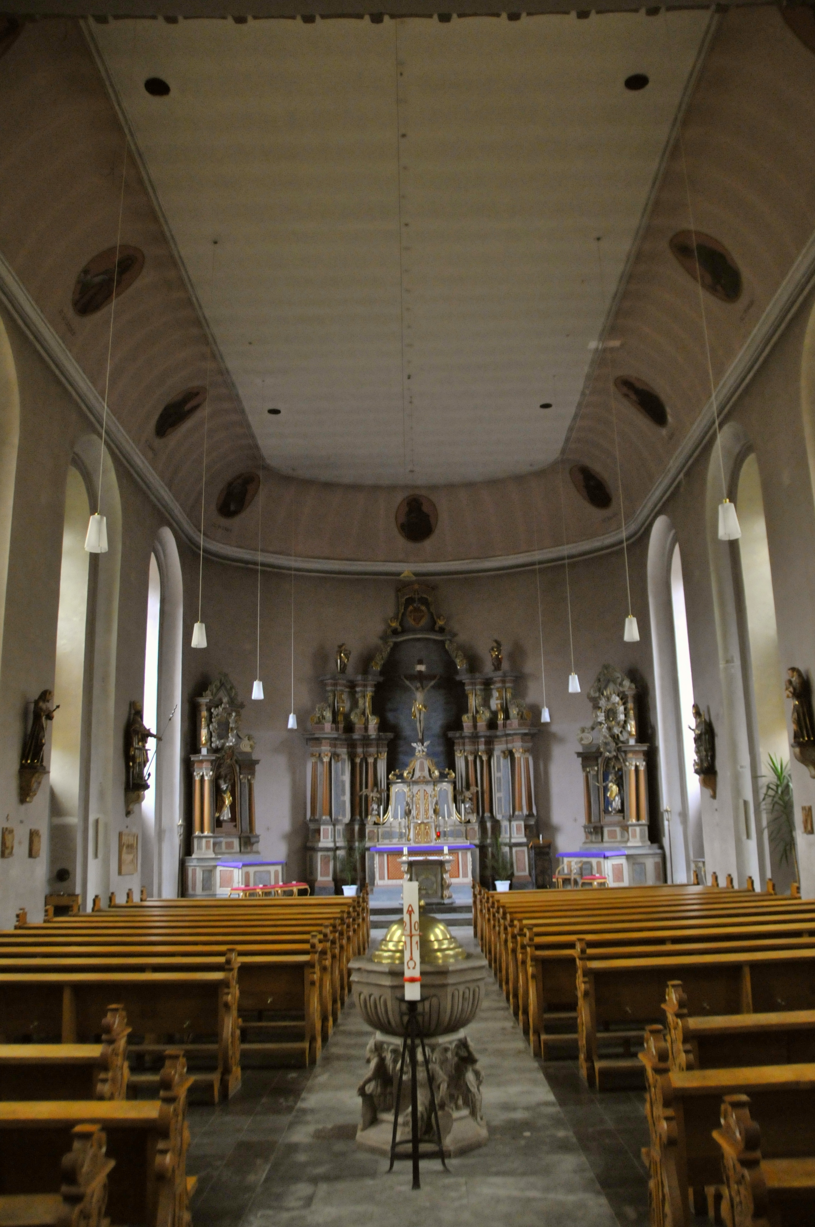 Trittenheim, Pfarrkirche